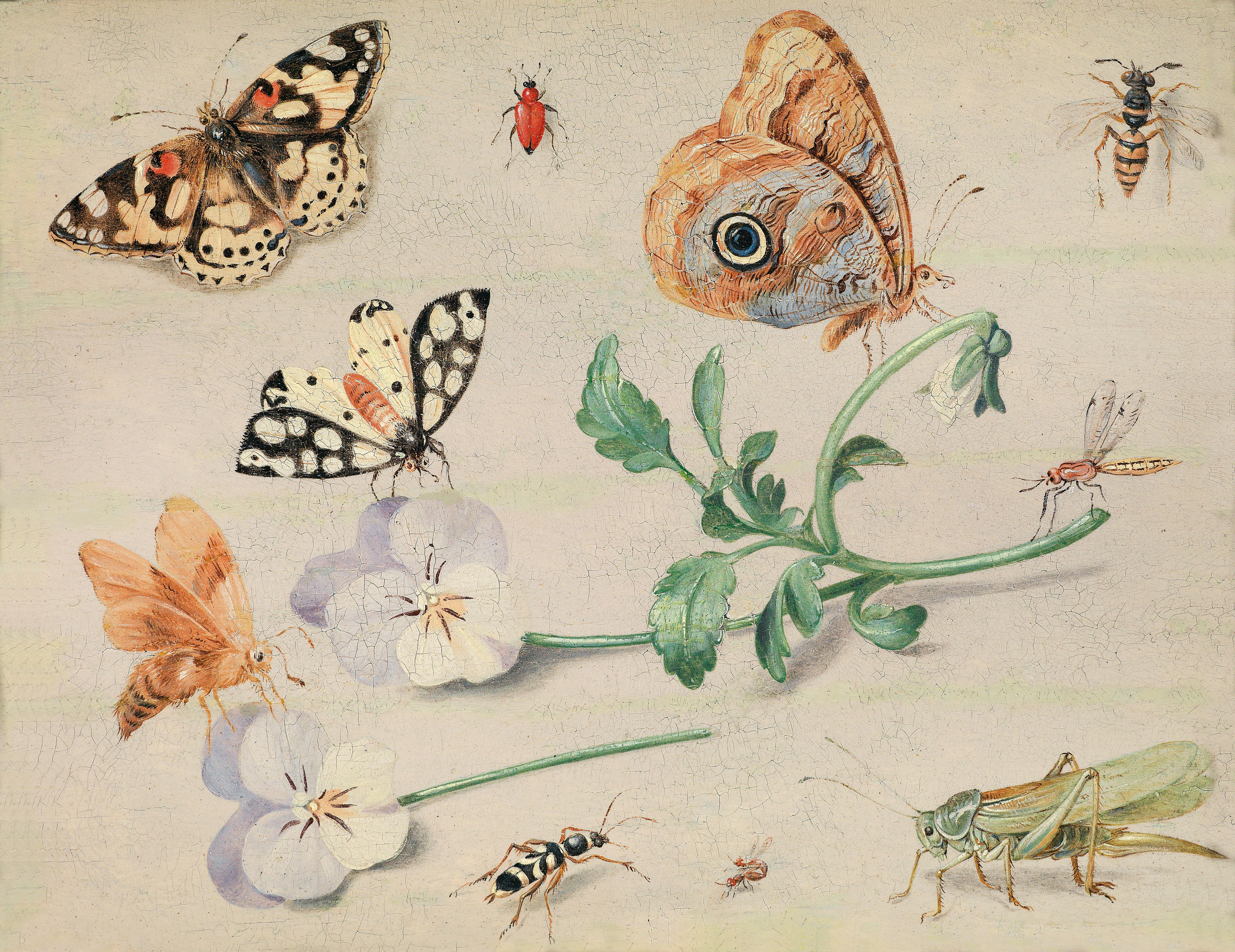 Studie von Insekten und Blumen, Öl auf Holz, 14,2 x 18,5 cm